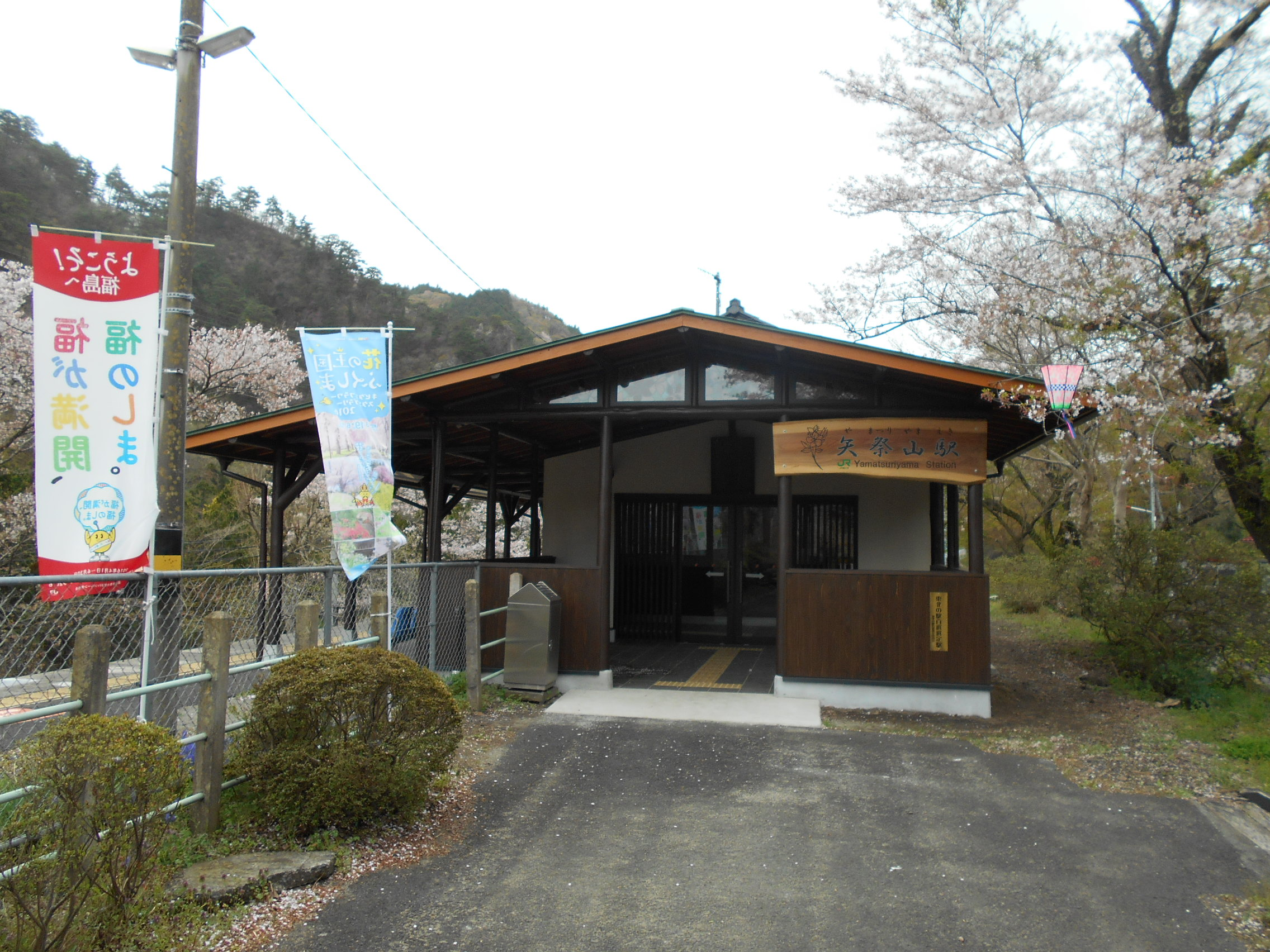 JR東日本 矢祭山駅